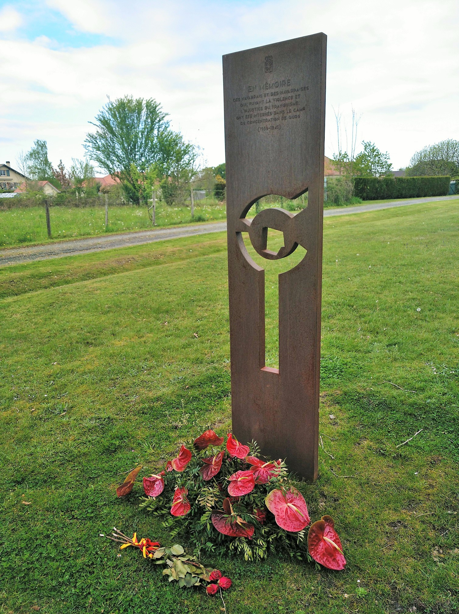 Gurseko esparruko Gerra Zibileko nafar iheslarien omenezko oroitarria, Bearno